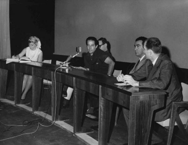 "La battaglia di Algeri" - Regia Gillo Pontecorvo - 1966 - Il regista Gillo Pontecorvo alla conferenza stampa della presentazione del film alla Mostra Internazionale del Cinema di Venezia